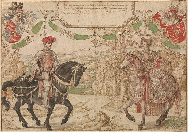 Johan IV van Nassau and His Wife Maria van Loon-Heinsberg.